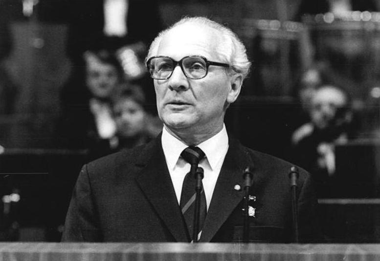 ADN-ZB Mittelstädt 23.10.87 Berlin: Jubiläum-Staatsakt. Mit einem Staatsakt der Deutschen Demokratischen Republik im Palast der Republik fanden die Feierlichkeiten zum 750jährigen Jubiläum Berlins ihren Höhepunkt. Der Generalsekretär des ZK der SED und Vorsitzende des Staatsrates der DDR, Erich Honecker, bei seiner Festansprache.